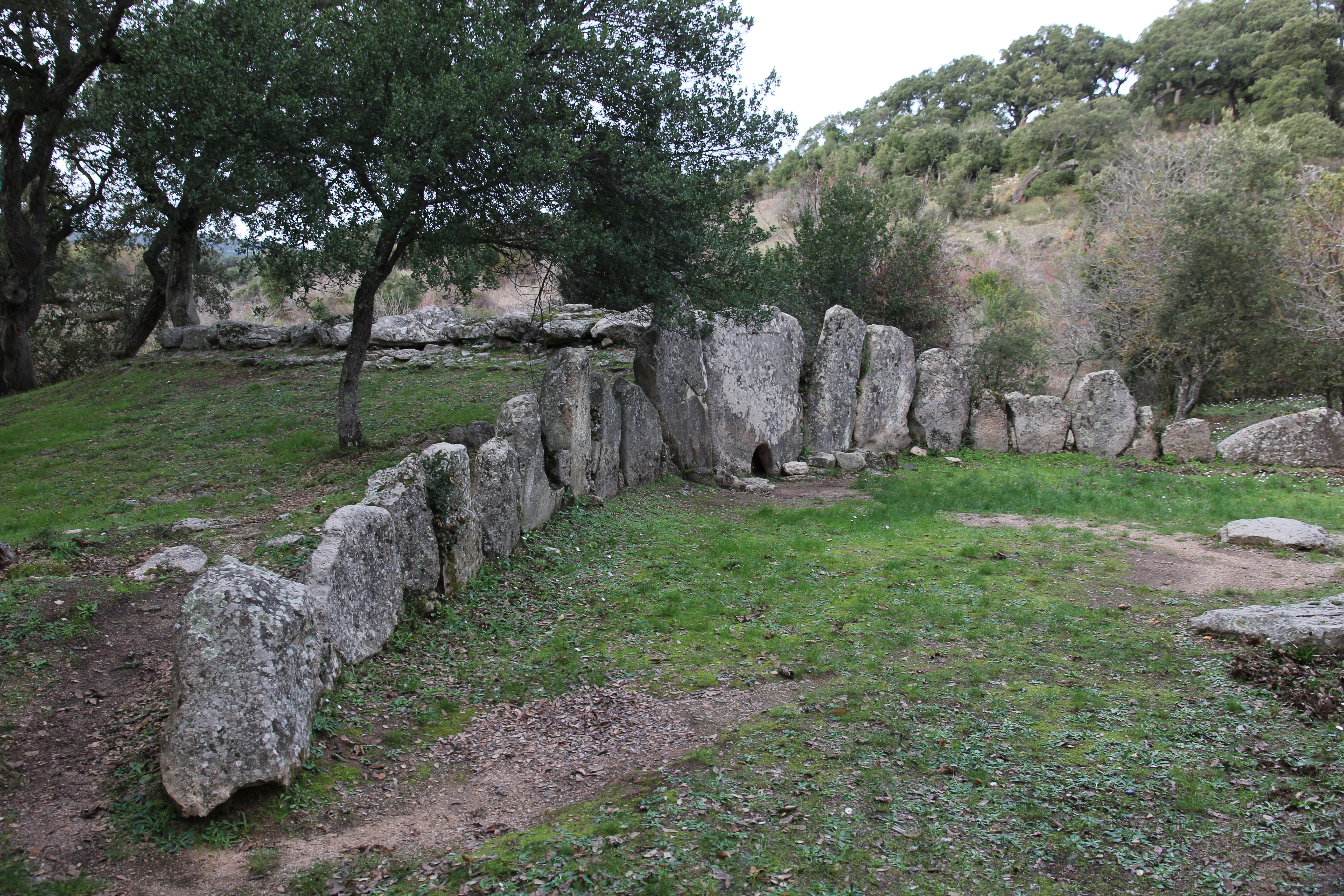 Tomba dei giganti di Pascaredda - m 442 s.l.m.